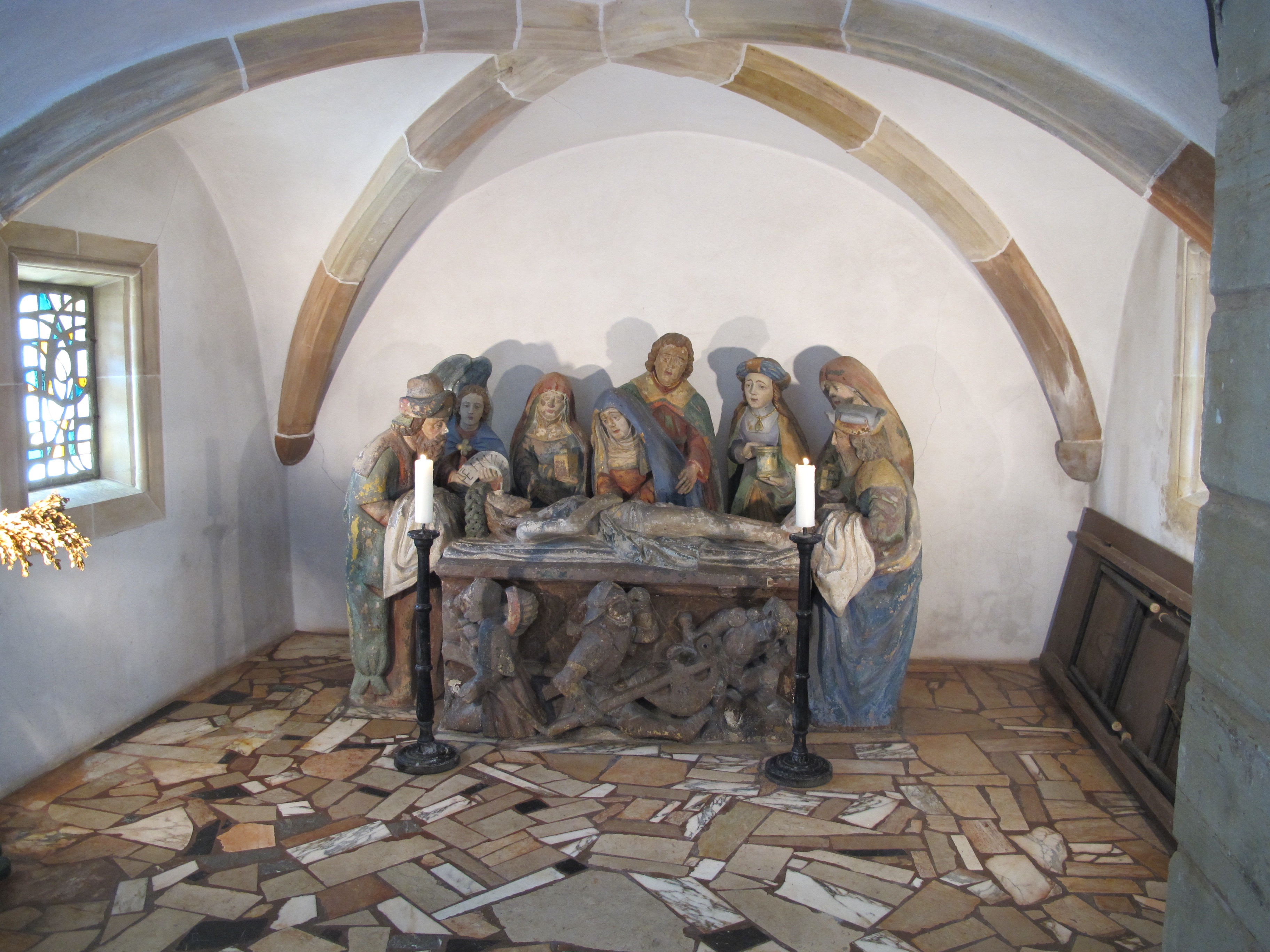 Monument du XVIe siècle représentant la mise au tombeau du Christ.